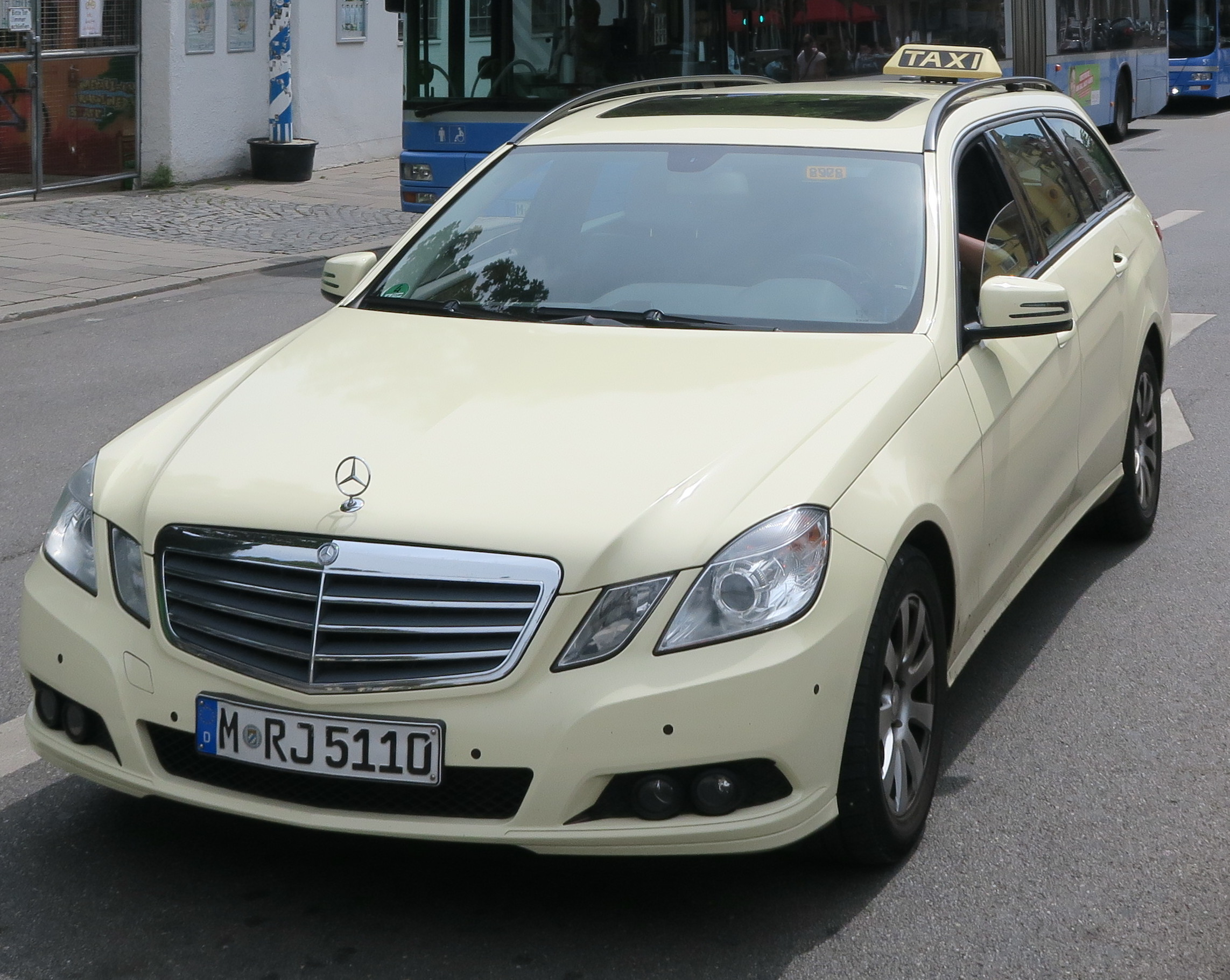 Öffentliche Verkehrsmittel in der Corneliusstraße in München